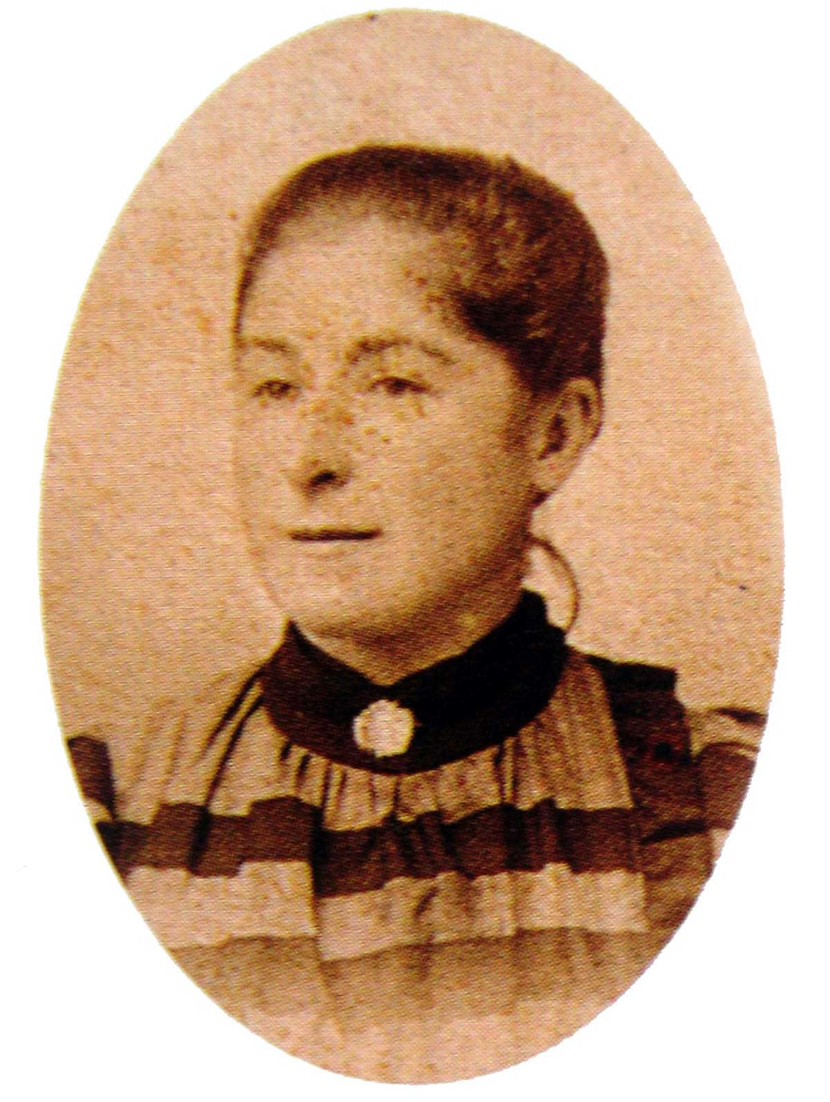 Barbara 'Baba' Uffer, 1873 - 1935, im Alter von 20 Jahren